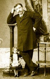 Pauline Musters, Nederlandse liliputter